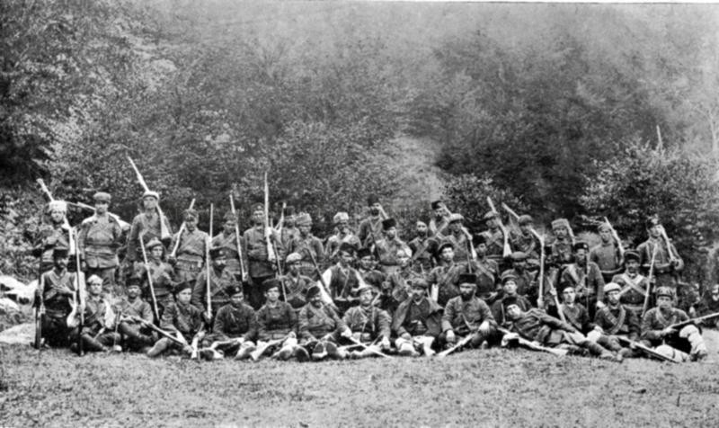 Bulgarian revolutionaries in Macedonia